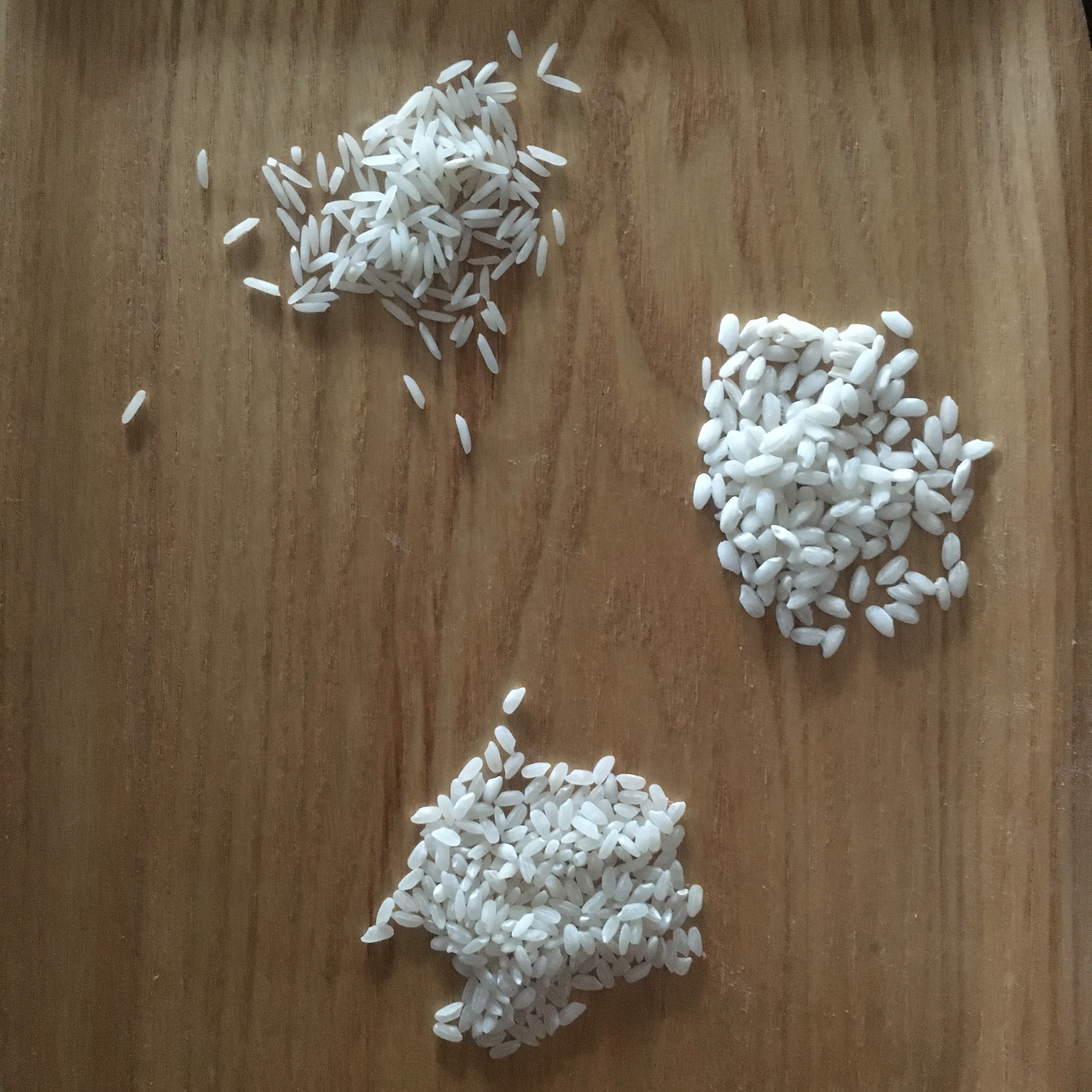 Vasemmalla puuroriisiä, alhaalla risottoriisiä, oikealla basmatiriisiä.